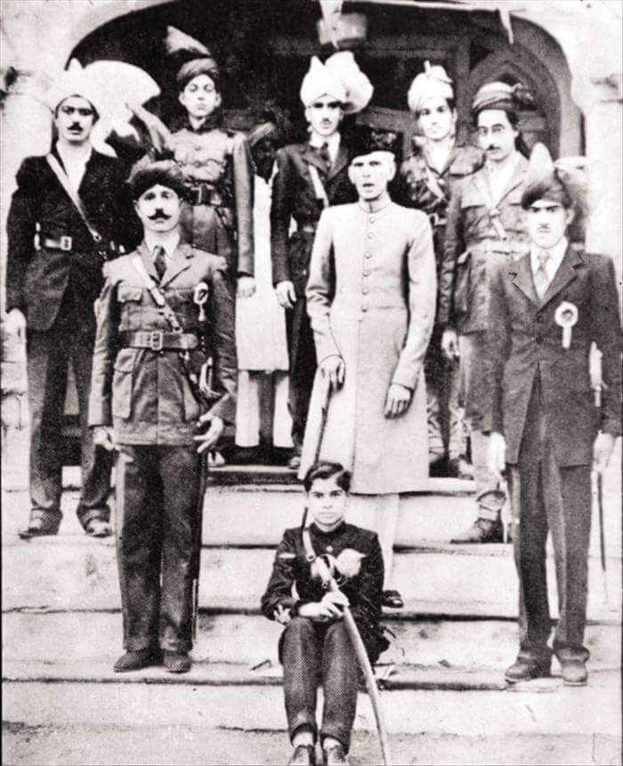 Quaid e Azam Lyallpur